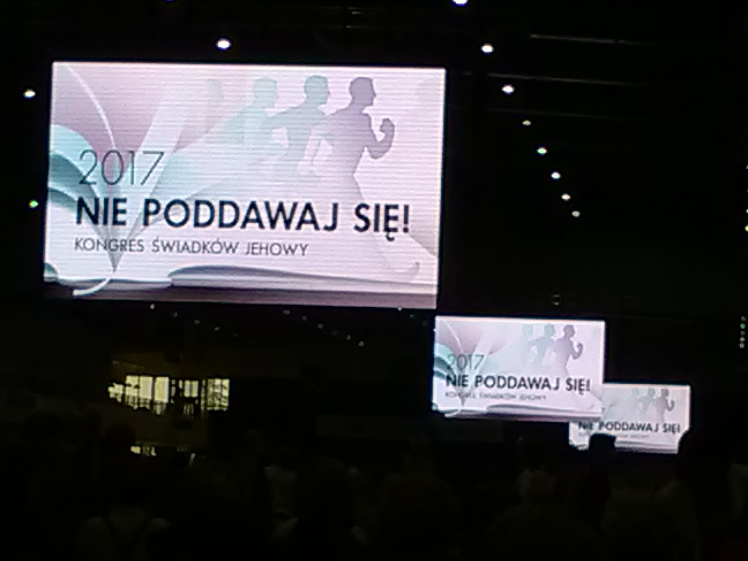 Nie poddawaj się! Kongres regionalny Świadków Jehowy w Poznaniu 2017.